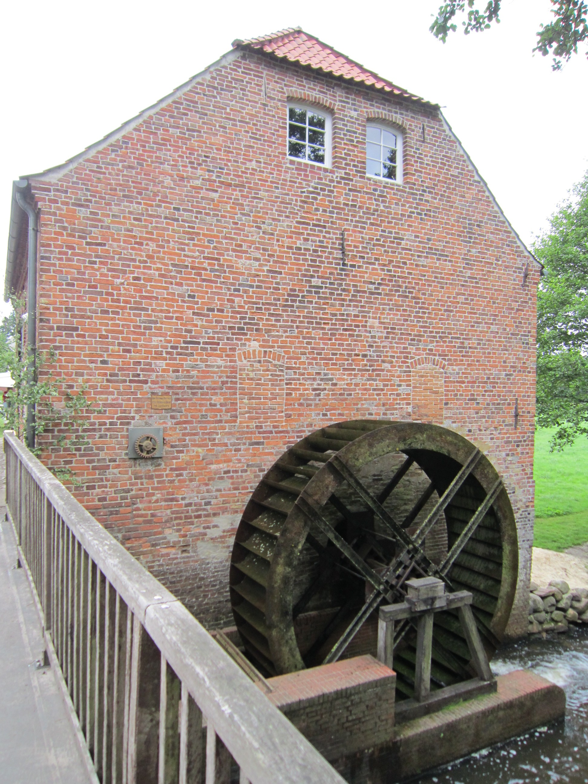 Wassermühle in Bademühlen (Landkreis Rotenburg/Wümme, Niedersachsen)